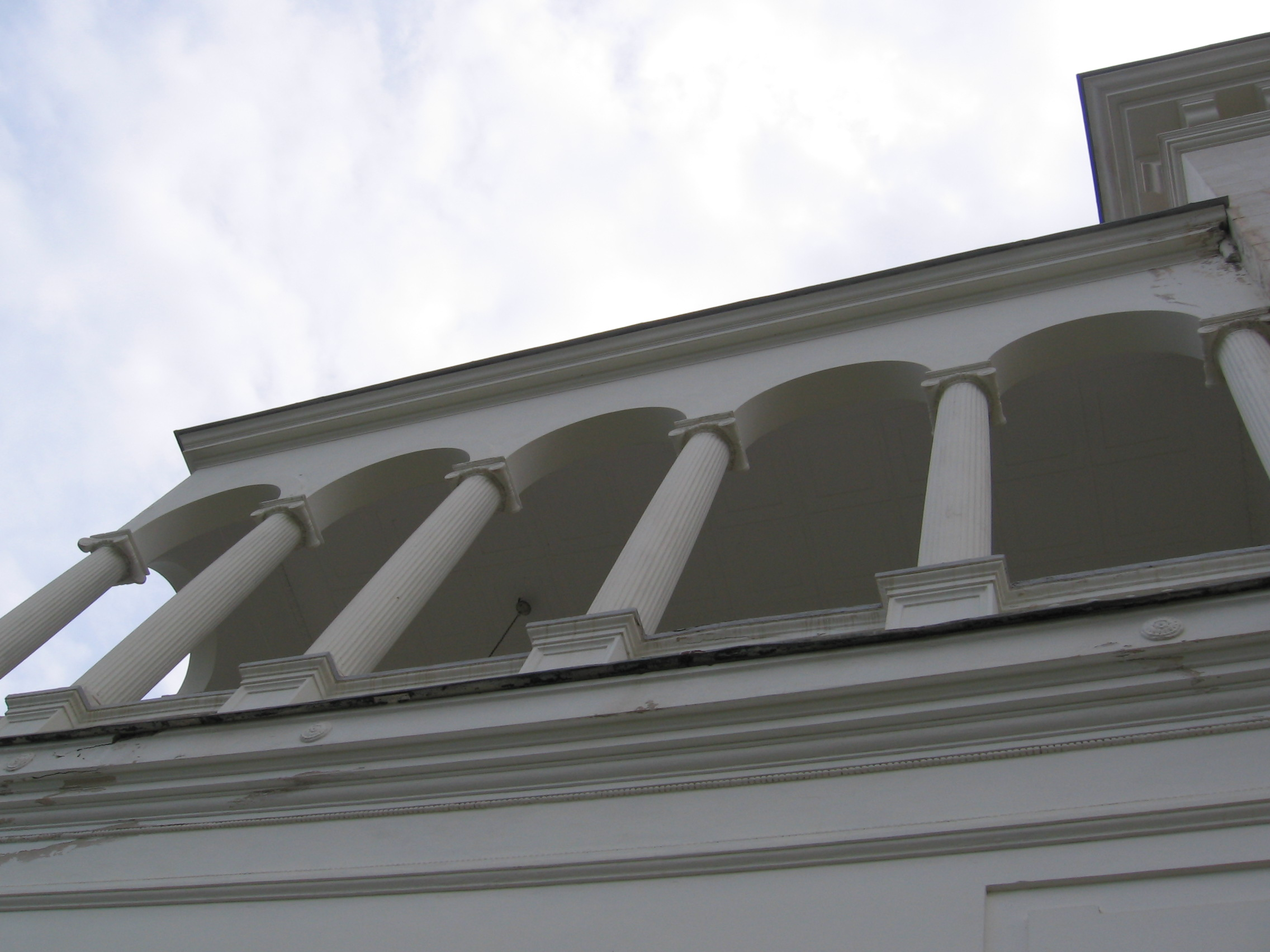 Аркада Лівадійського палацу. Крим.